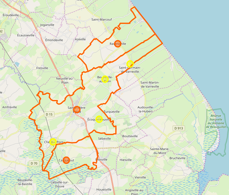 Carte de la commune nouvelle en 2019 de Sainte-Mère-Église avec ses communes déléguées